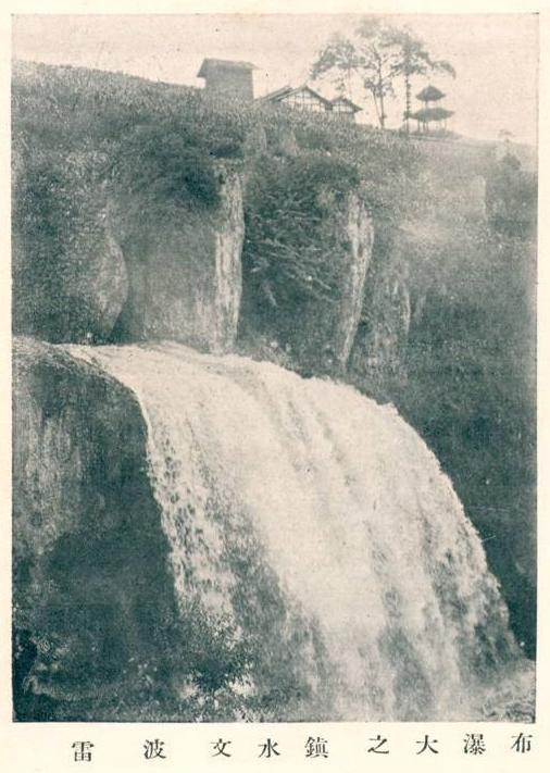 中文（台灣）: 雷馬峨屏調查記問題回報，常隆慶, 施懷仁, 俞德浚著，中國西部科學院，1935